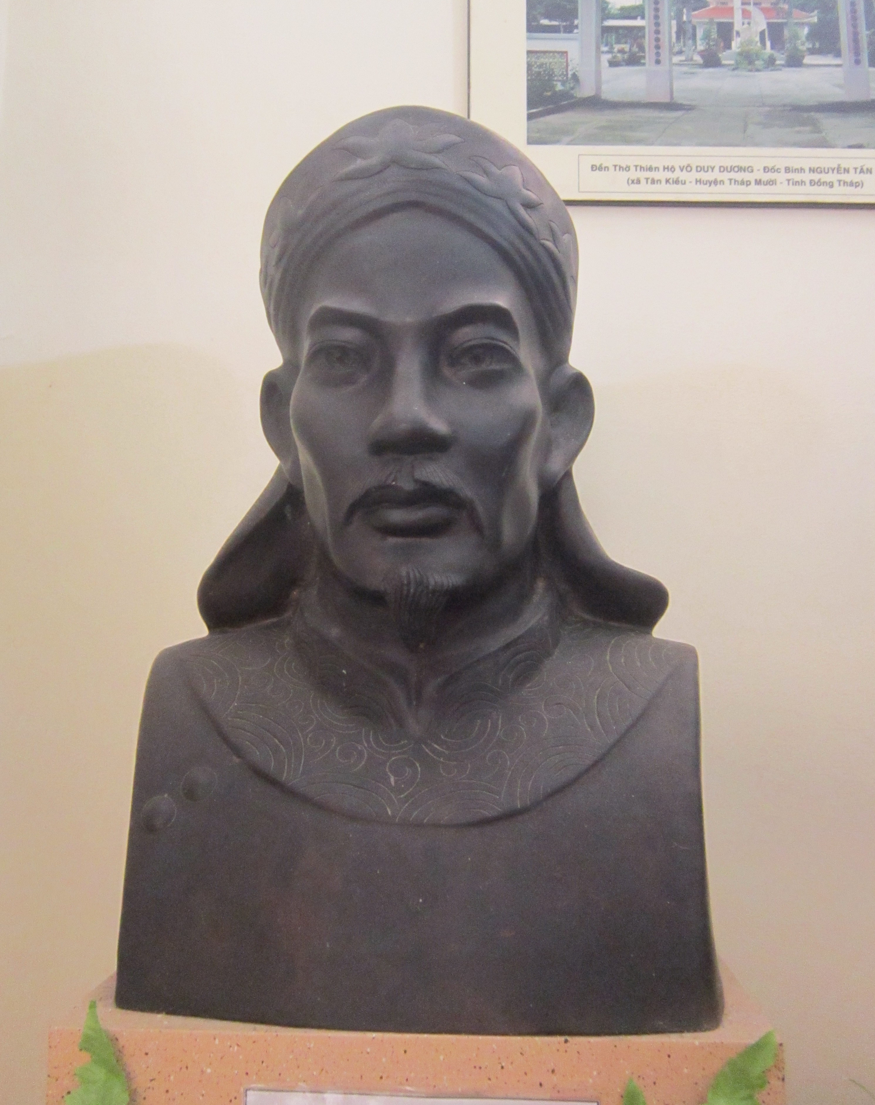 Tượng Võ Duy Dương (1827-1866) trong Bảo tàng tỉnh Đồng Tháp. Ông là lãnh tụ cuộc khởi nghĩa chống thực dân Pháp (1862-1866) ở Đồng Tháp Mười, Việt Nam.